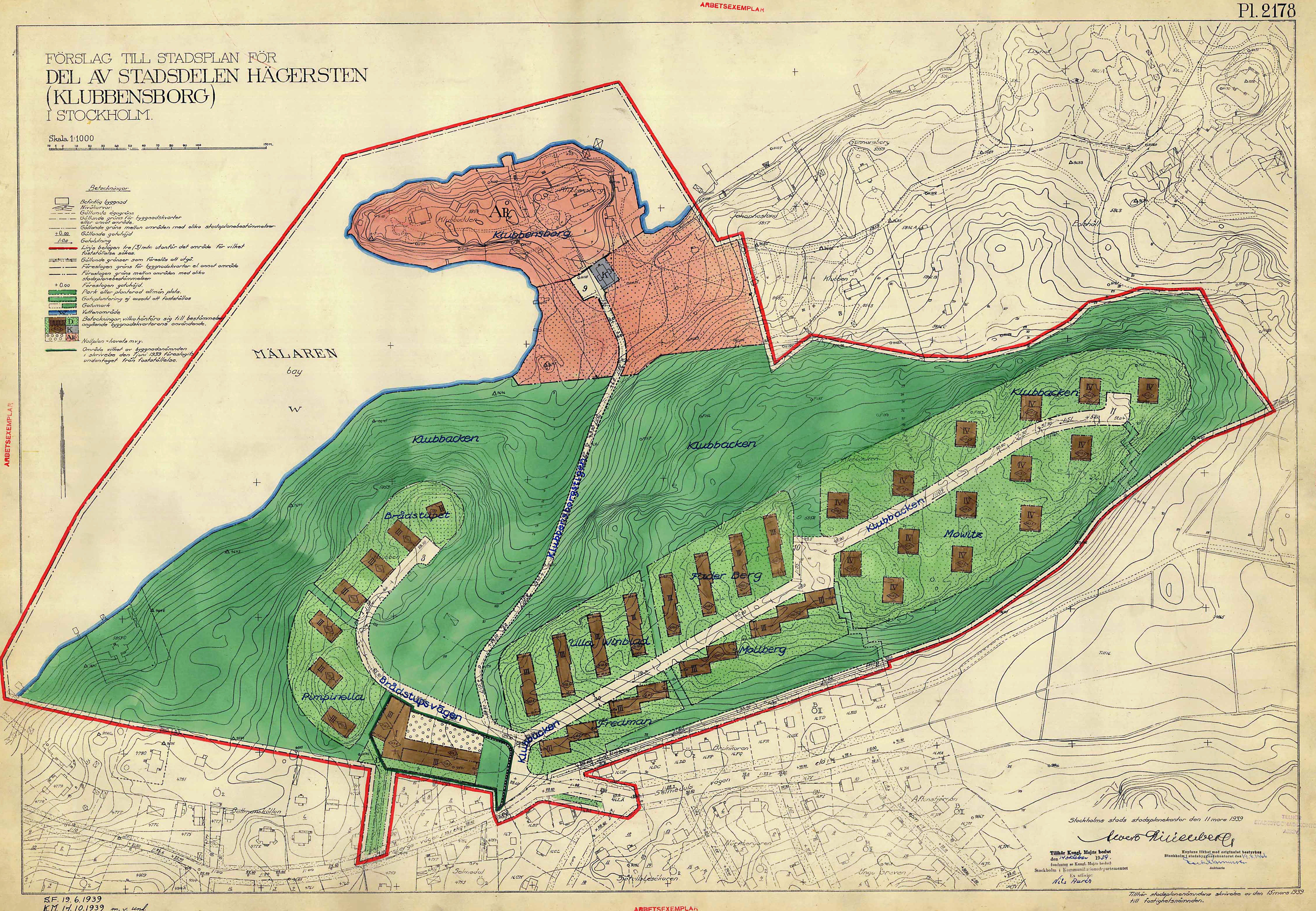 Stadsplan för Klubbacken i Hägersten, Stockholm